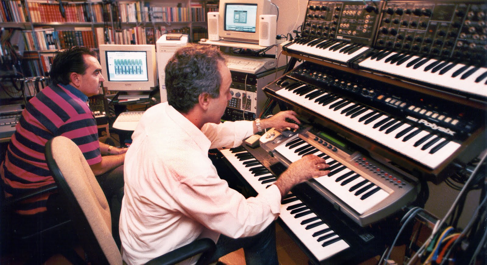 José Antonio Rodríguez y Vicente Aguilera, de Vam Cyborg